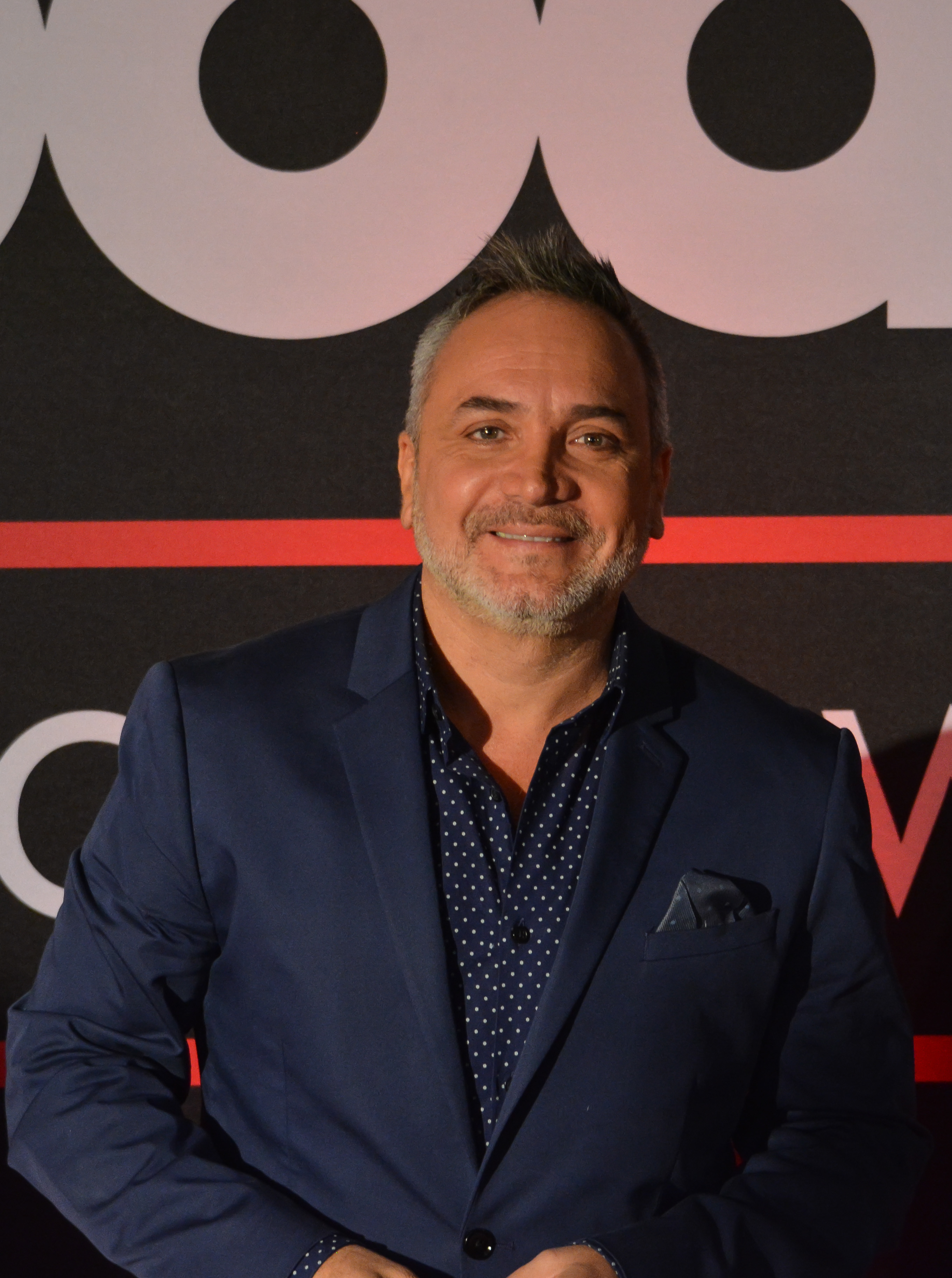 Gala Billboard Latin Music Showcase Chile 2018, Hotel Santiago, Santiago, Chile